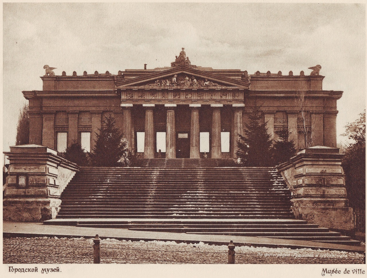 Міський музей Київ 1911